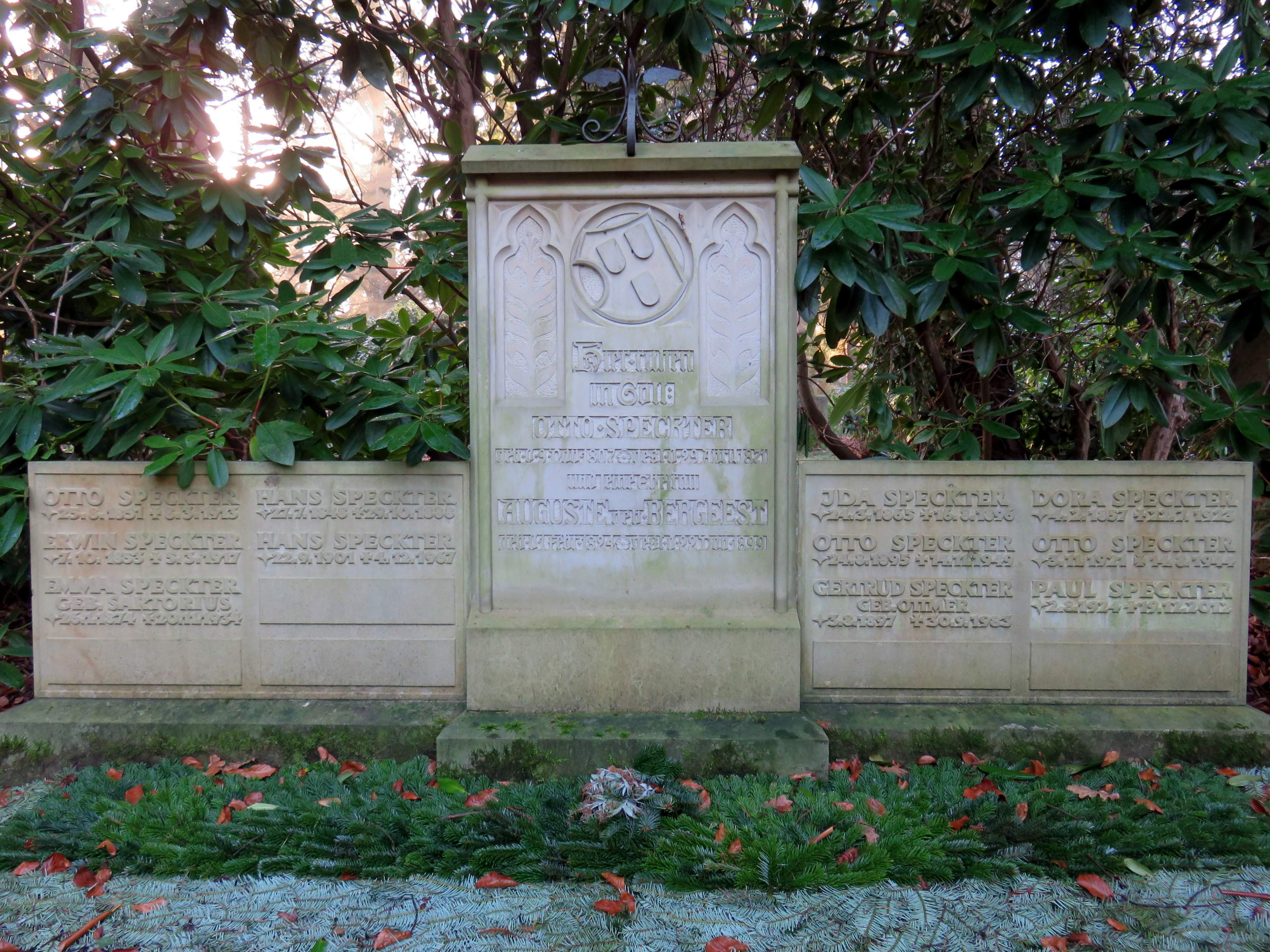 Grabmal von 1871 für den Hamburger Maler Otto Speckter auf dem Hamburger Friedhof Ohlsdorf, Lageplan: X 21 nahe Waldstraße und Kapelle 2. Siehe auch Barbara Leisner: Der Hamburger Hauptfriedhof Ohlsdorf, Band 2, S. 30/ Nr. 128.